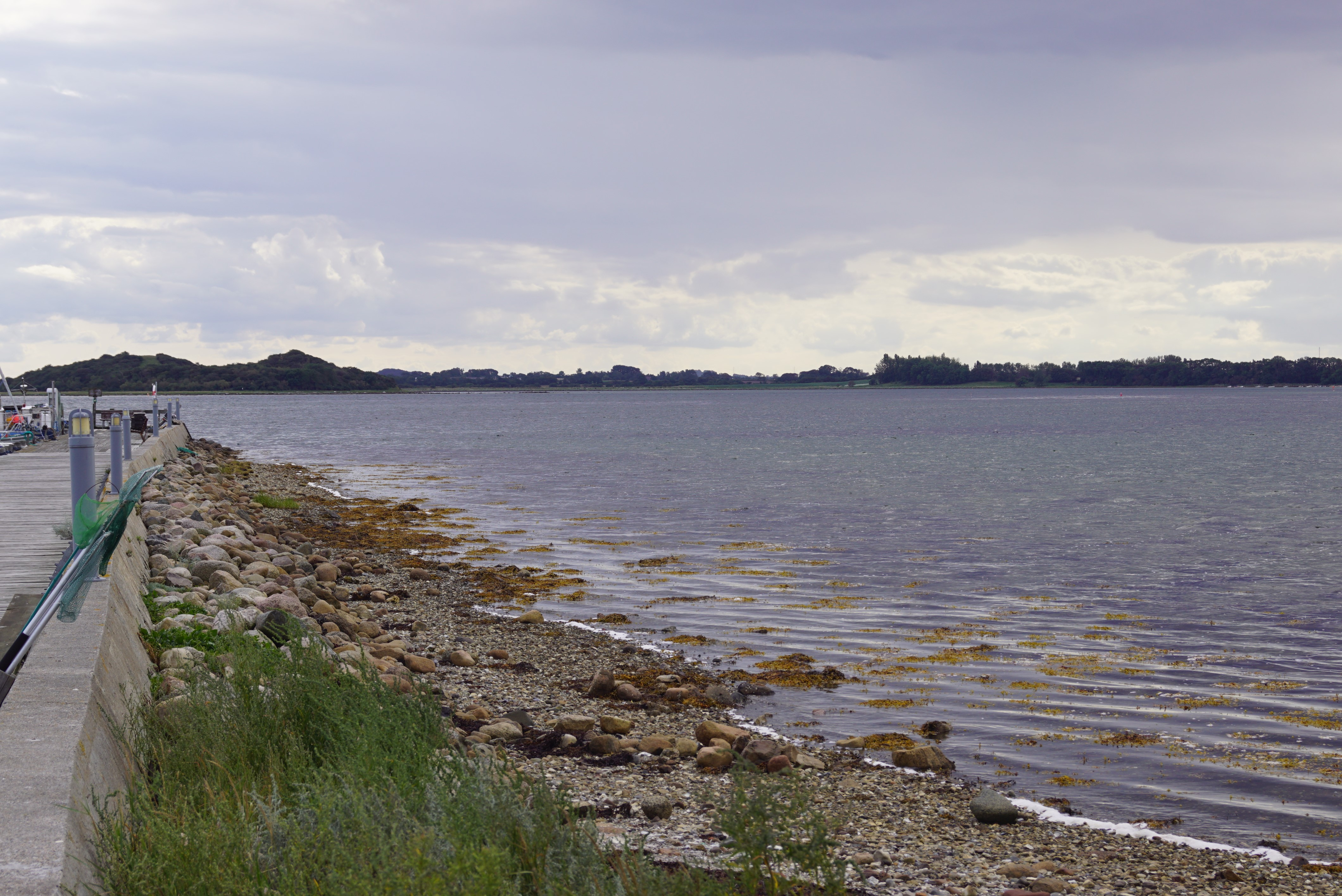 Stavns Fjord set mod syd fra Langøre